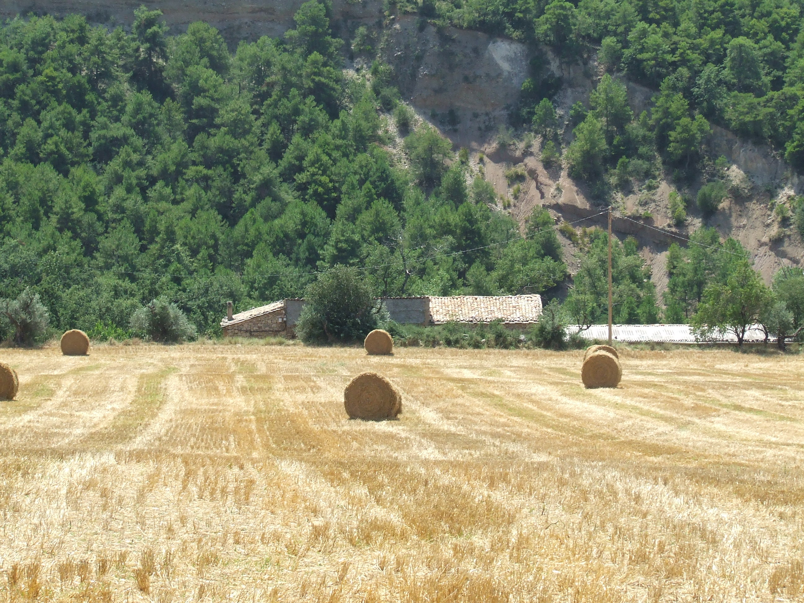 Les Llongues i Cal Castelló (Abella de la Conca, Pallars Jussà)